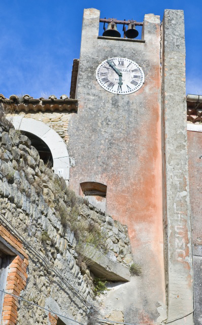 Torre dell'orologio del castello nel centro storico abbandonato di Castelpoto (BN)